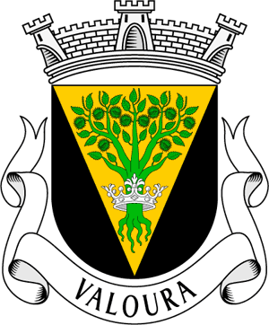 Brasão da freguesia de Valoura (concelho de Vila Pouca de Aguiar)